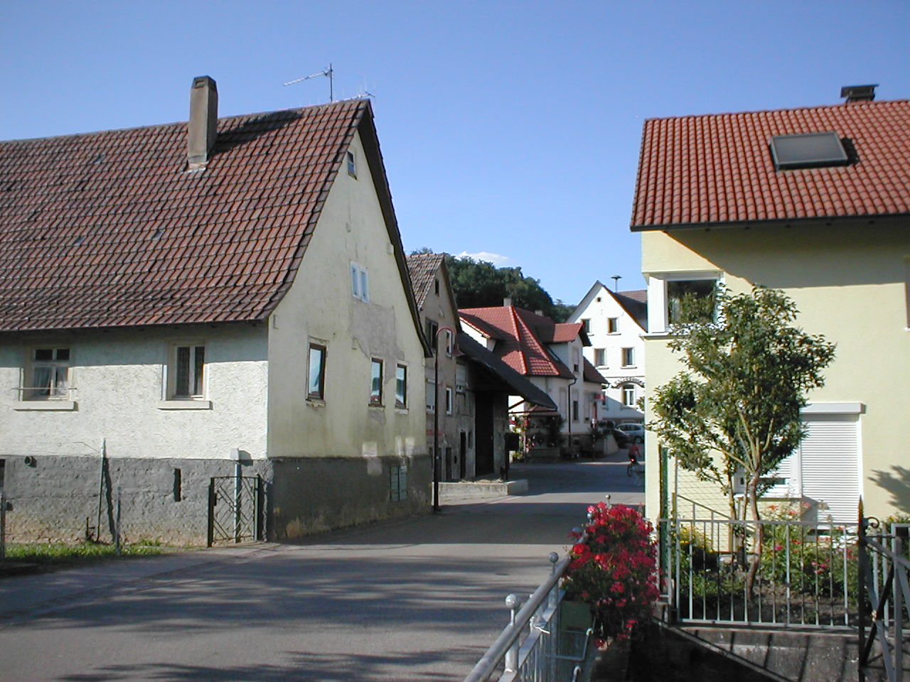 Straßenszene im bäuerlich geprägten Altort von Neckarbischofsheim-Untergimpern